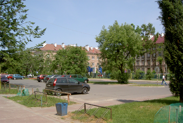 Nowa Sarzyna, Poland • City Centre / Centrum miasta